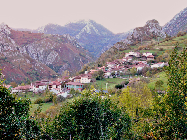 Imagen de Sames Asturias